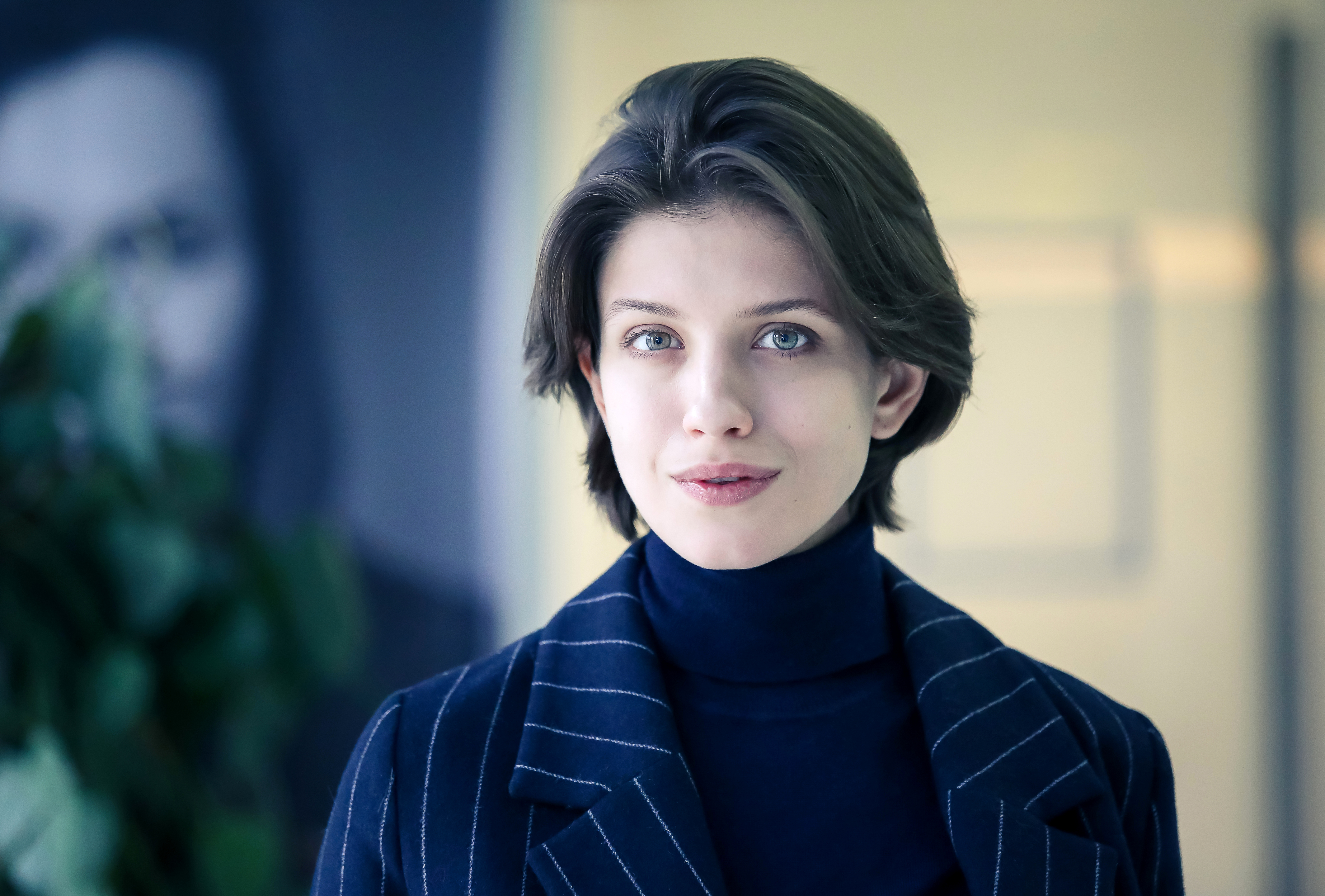 Российская актриса Анна Чиповская. Пресс-конференция, посвященная старту Третьей общероссийской акции "Дарите книги с любовью" в ТАСС.